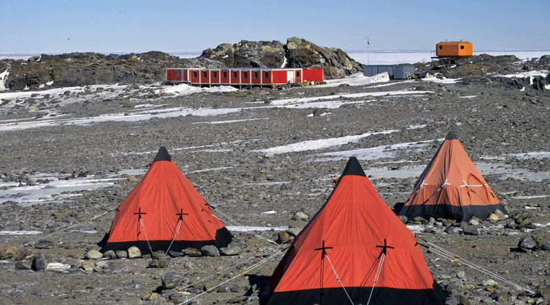 Die Gondwanastation mit Scott-Zelten als Schlaflager für die Expeditionsteilnehmer